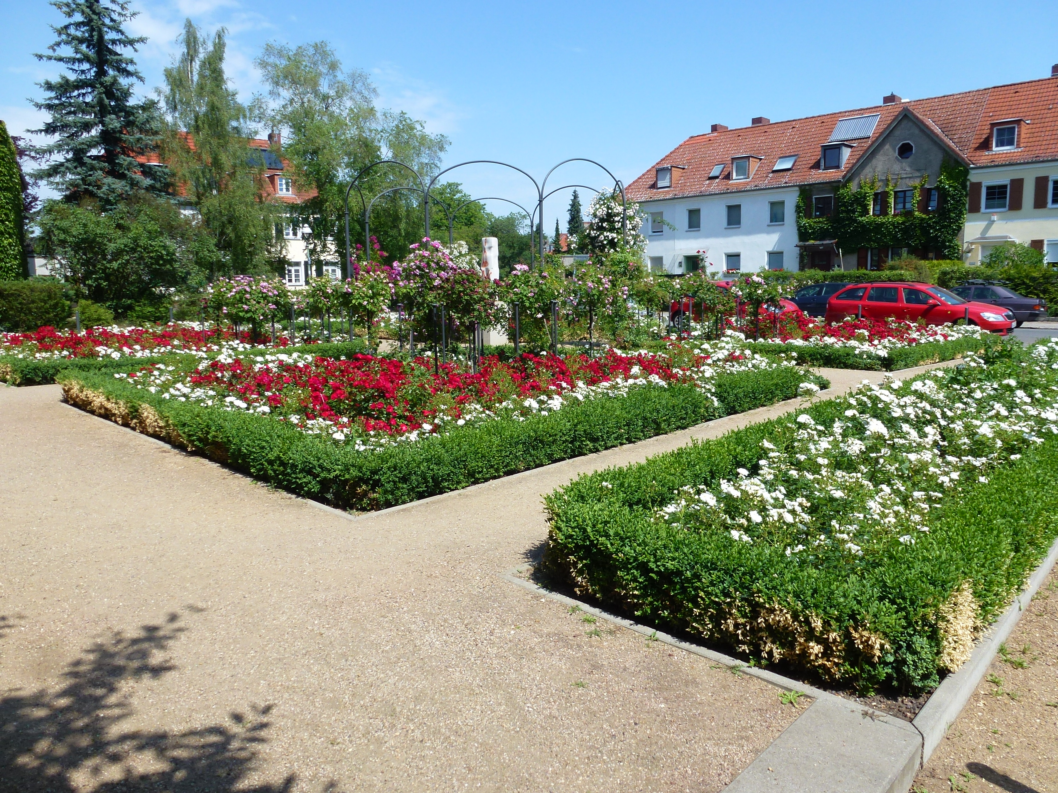 Berlin-Tempelhof Rumeyplan Rosengarten